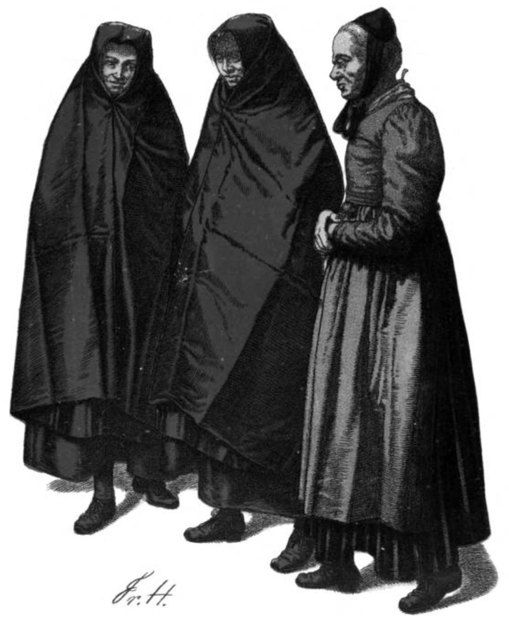 Friedrich Hottenroth: Nassauisches Trachtenbuch Tafel 14: Bäuerinnen im Trauer- und Hausanzug aus Strassebersbach und Mandeln